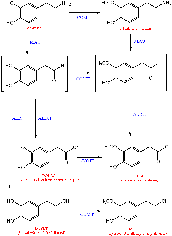 Métabolisme de la dopamine [MAO = Monoamine oxidase, COMT = catechol-O-méthyltransférase, ALR = Aldéhyde réductase, ALDH = Aldéhyde déshydrogénase] Auteur : DavidG